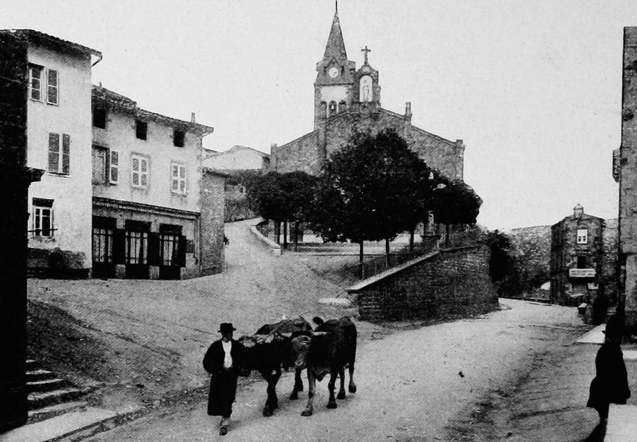 Dictionnaire illustré des communes du département du Rhône. Tome 2 / par MM. E. de Rolland et D. Clouzet.